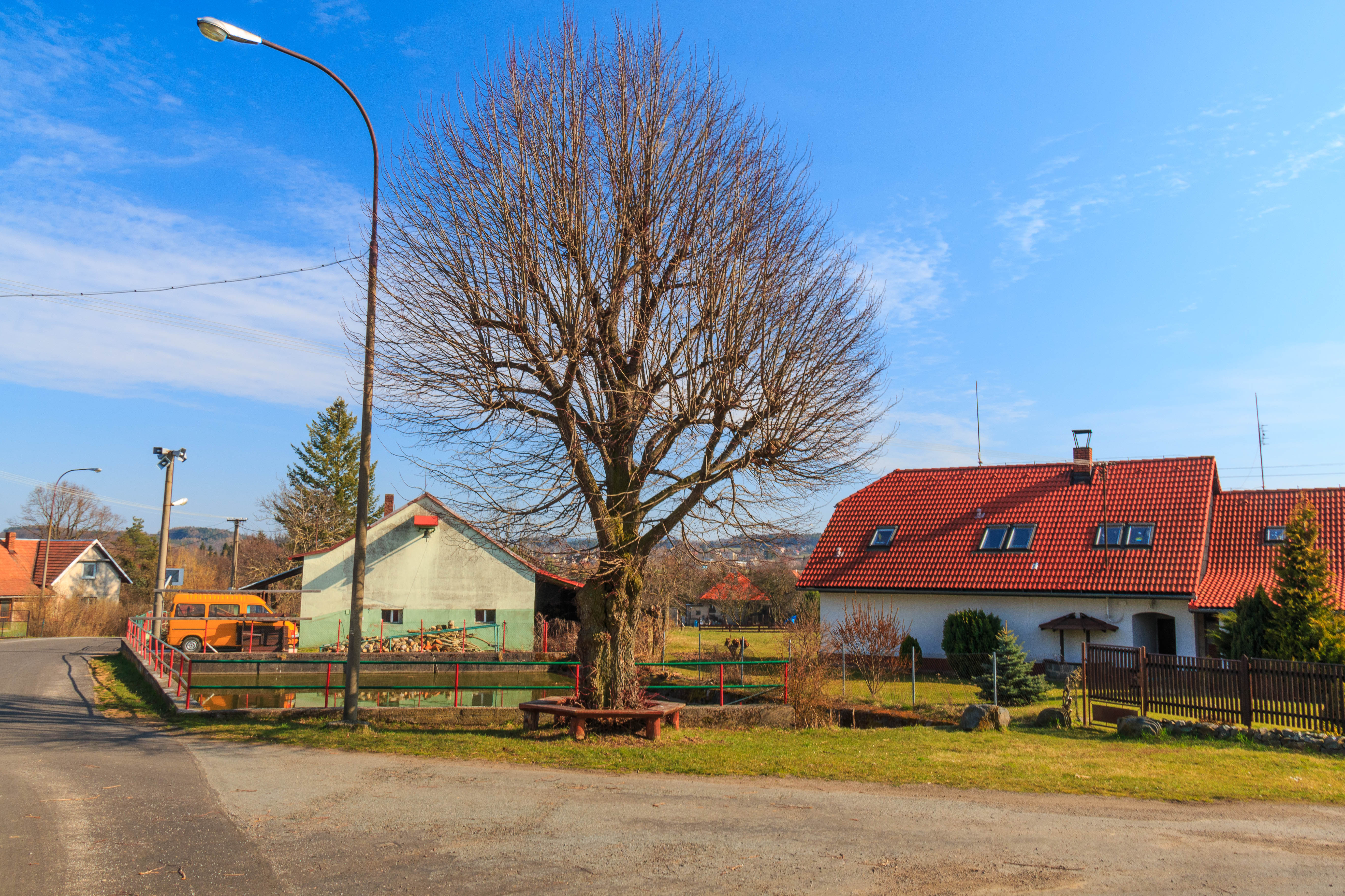 Bošov čp. 72